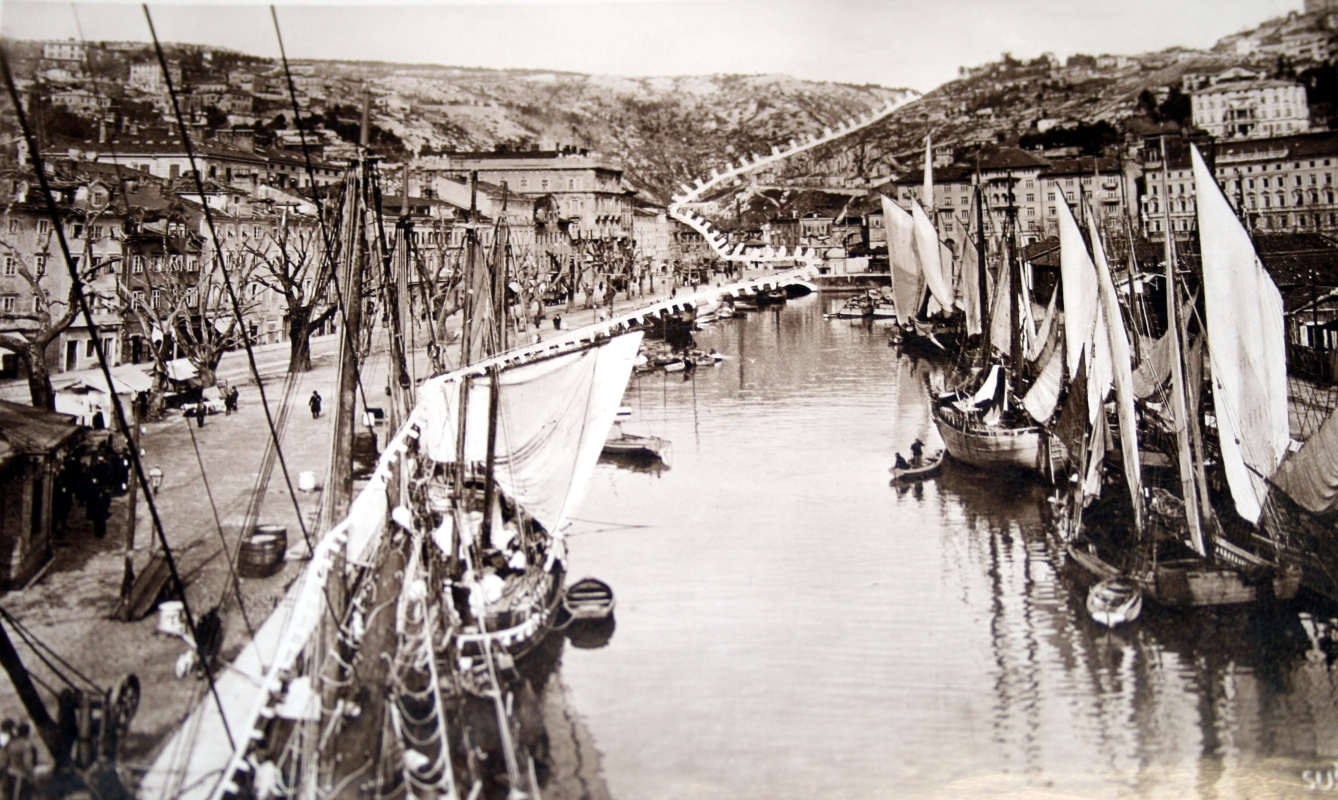 Rijeka, Granica na Mrtvom kanalu 1933. godine